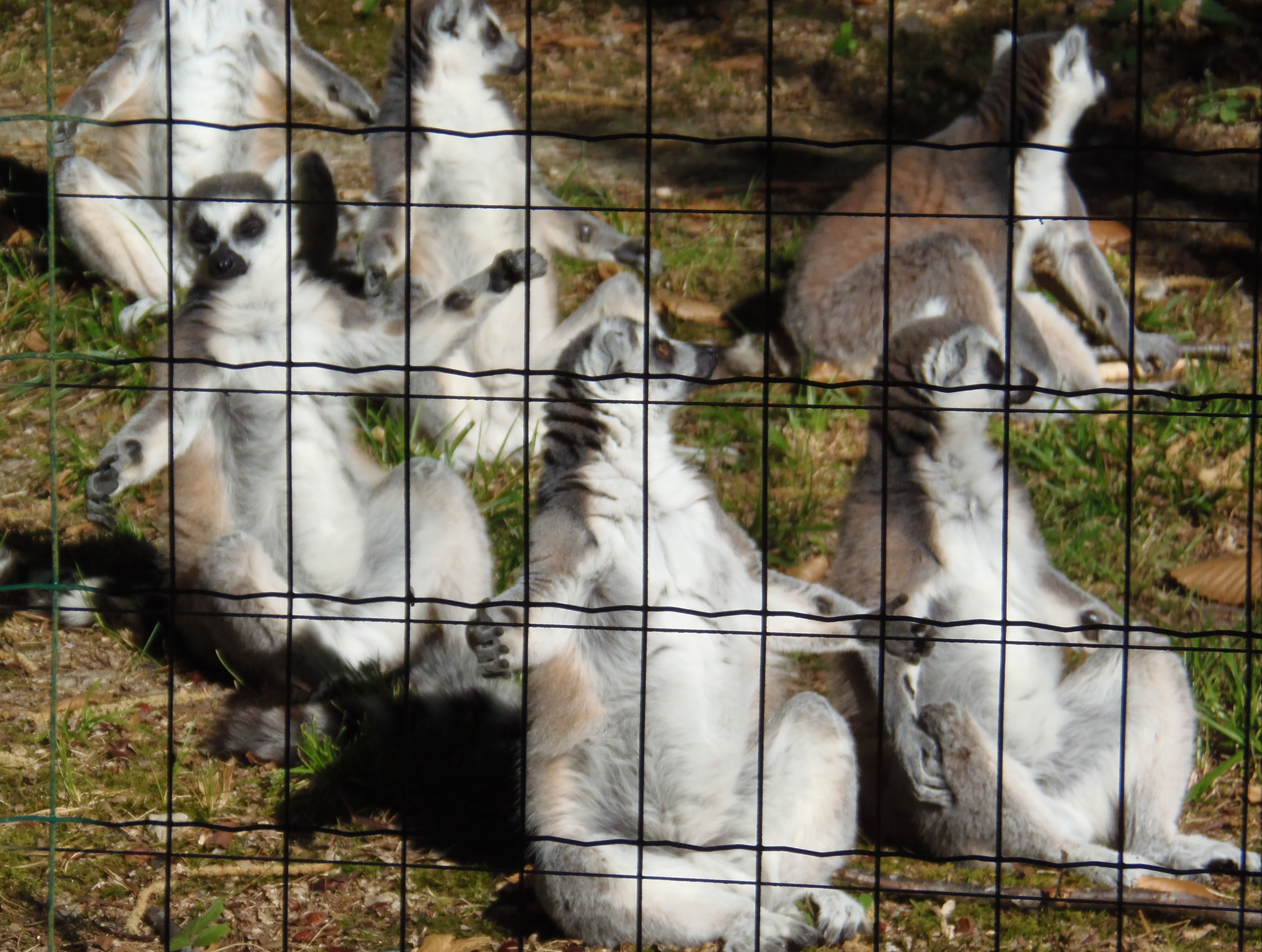 Maki catta en séance de « bain de soleil » au zoo Cerza (Normandie, France).